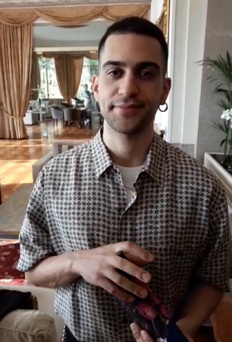 Italian singer Mahmood